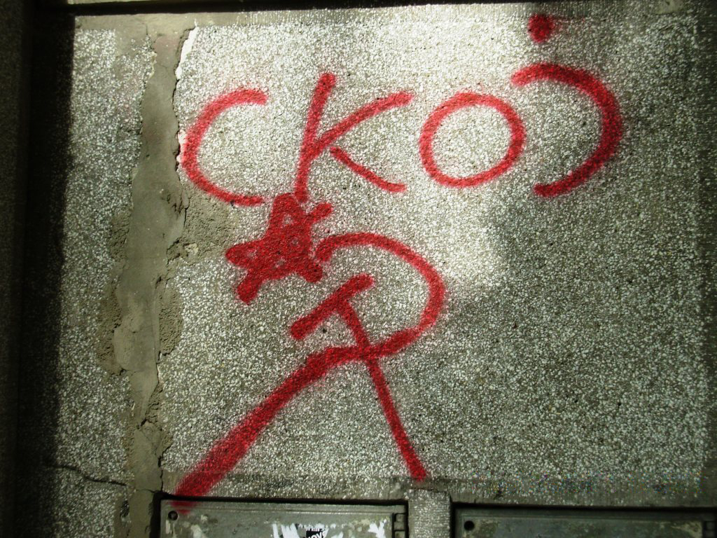 СКОЈ графити у Београду. Сликао Голдфингер.